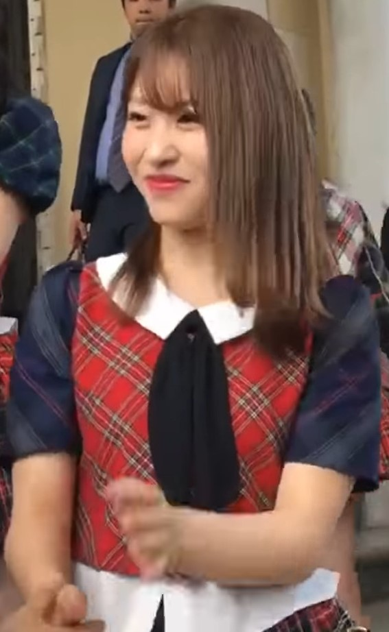 AKB48のメンバー中西智代梨